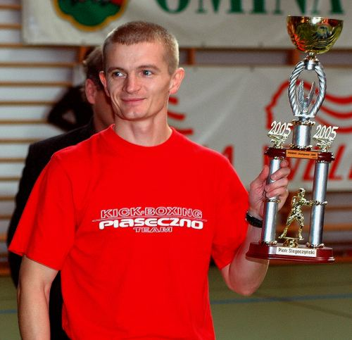 Piotr Siegoczyński